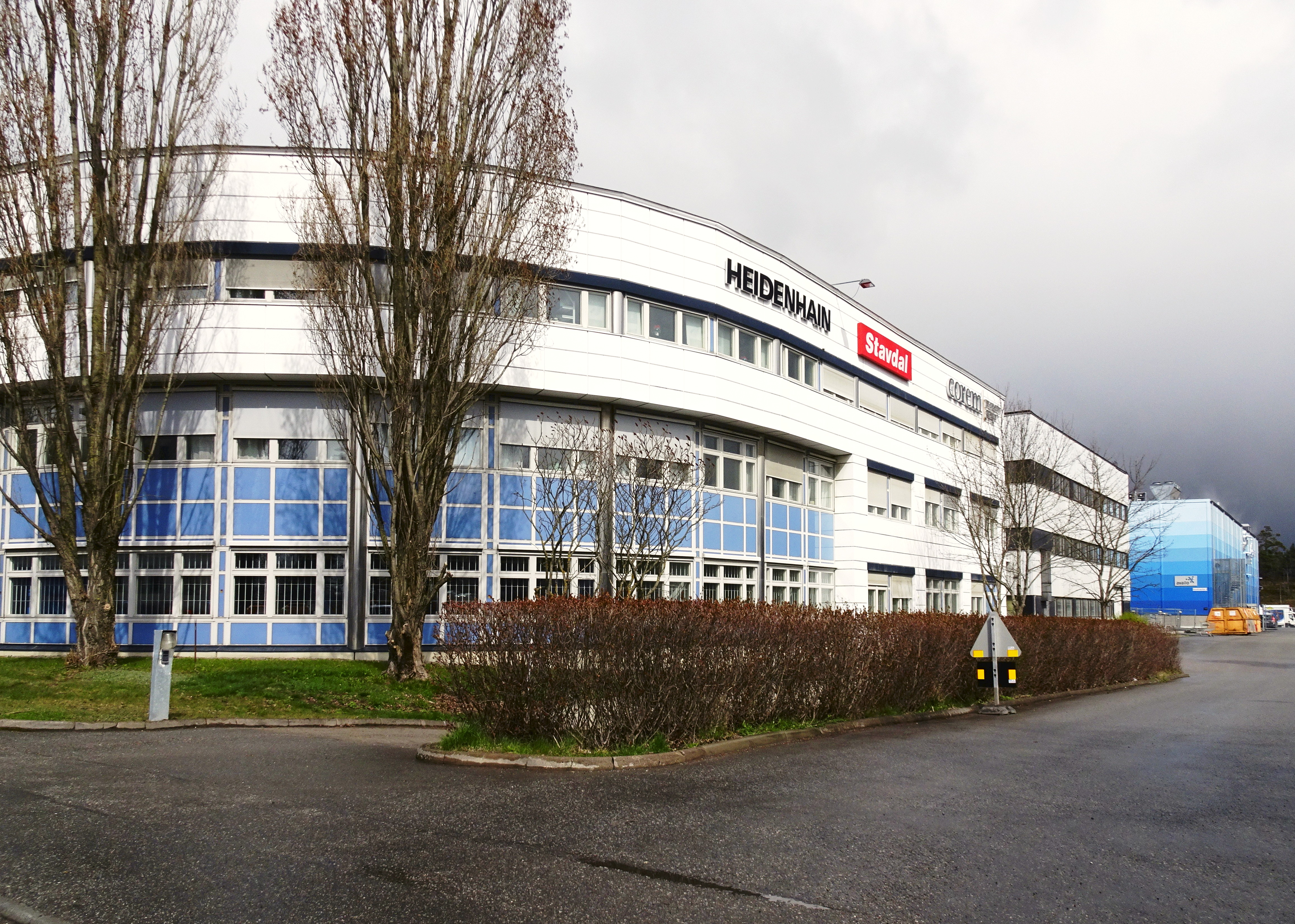 Sätra industriområde, Skärholmsvägen 3 (f.d. Honeywell), arkitekt Bo Möller